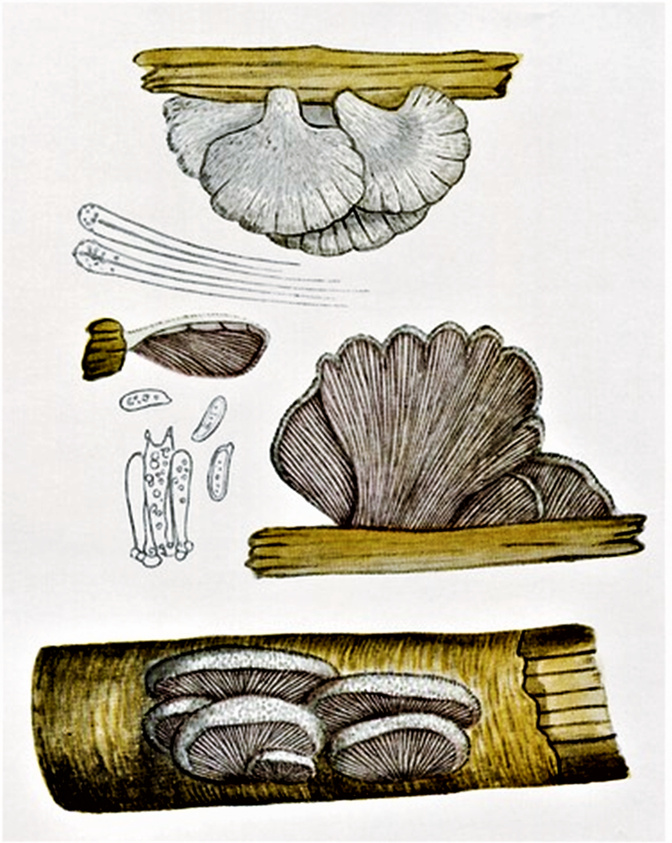 Giacomo Bresadola: Schizophyllum commune Fries (1815)